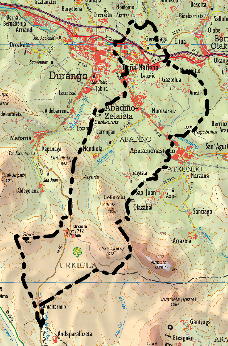 Abadiñoko udalerriaren mapa